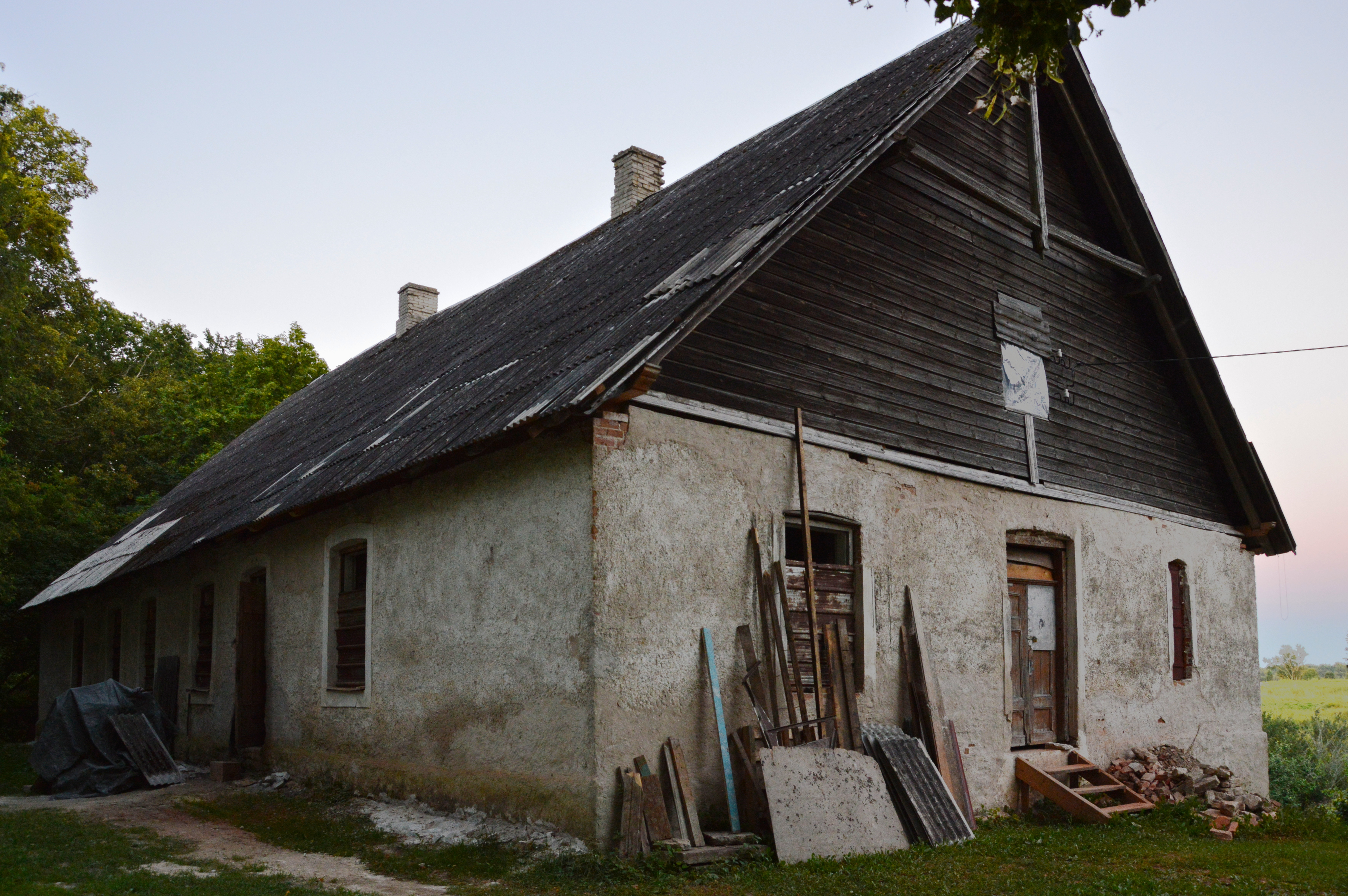 Vana-Vigala mõisa valitsejamaja